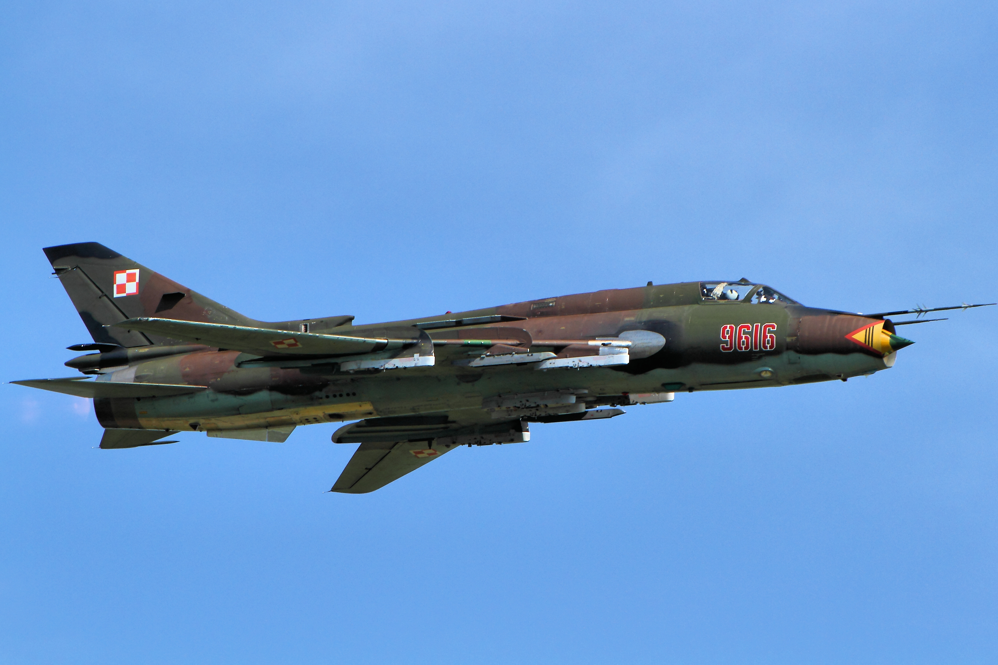 SU-22 Fitter - RIAT 2014